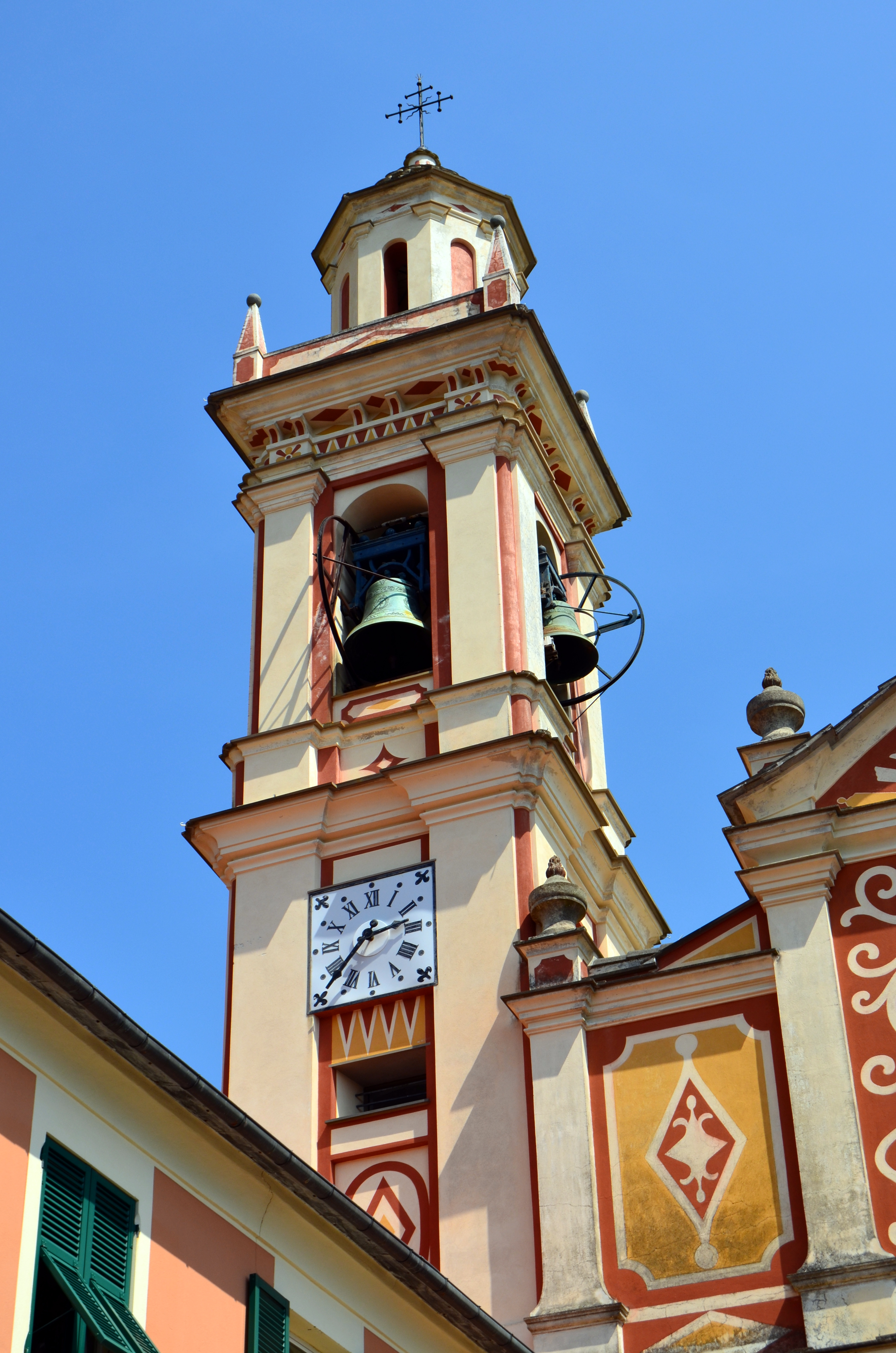 Il campanile della chiesa di San Bartolomeo apostolo, San Bartolomeo, Leivi, Liguria, Italia